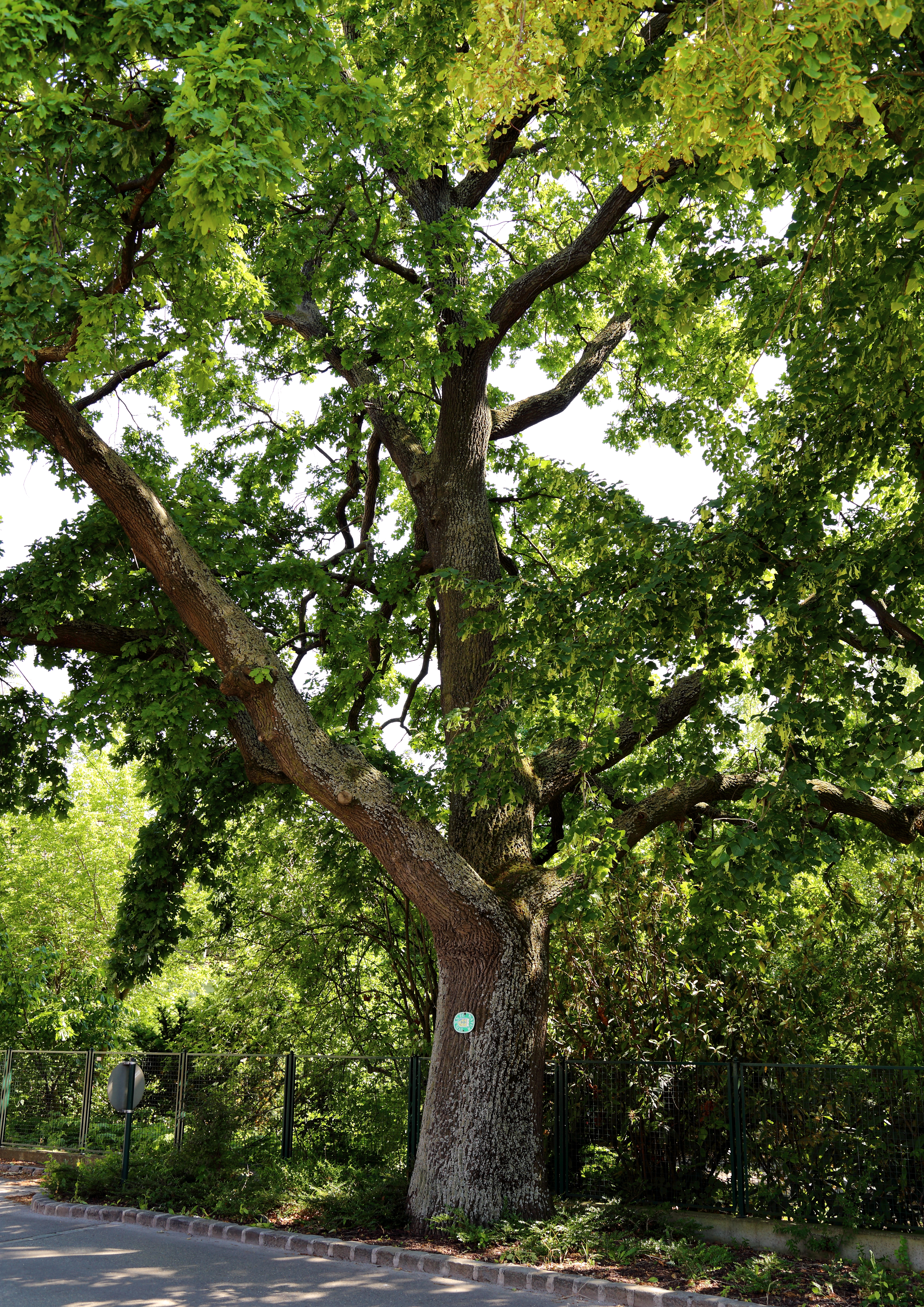 Die unter Naturschutz stehende Stieleiche nächst dem Krankenhaus am Alter Ziegelweg in der niederösterreichischen Stadt Tulln an der Donau. This media shows the natural monument in Lower Austria with the ID TU-024.